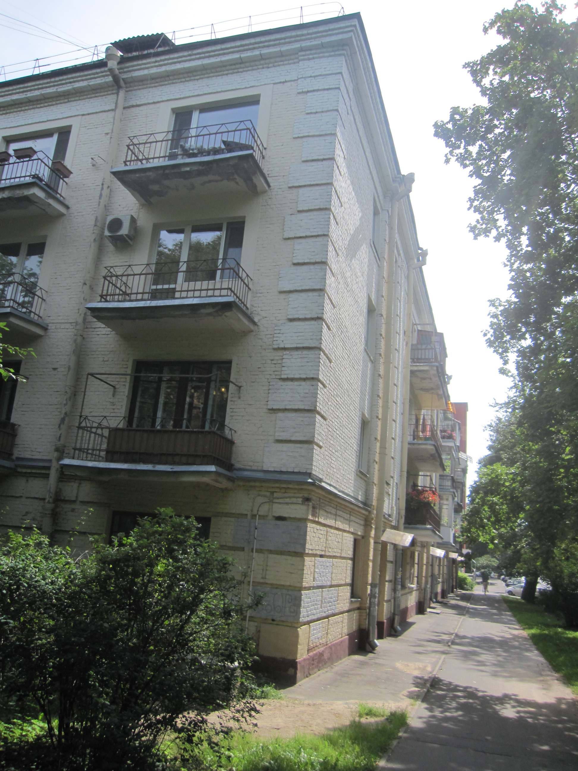 На вуліцы Чарнышэўскага (Мінск) многа 4-павярховых жылых дамоў часоў пасляваеннай савецкай забудовы. Напрыклад, дом 12.